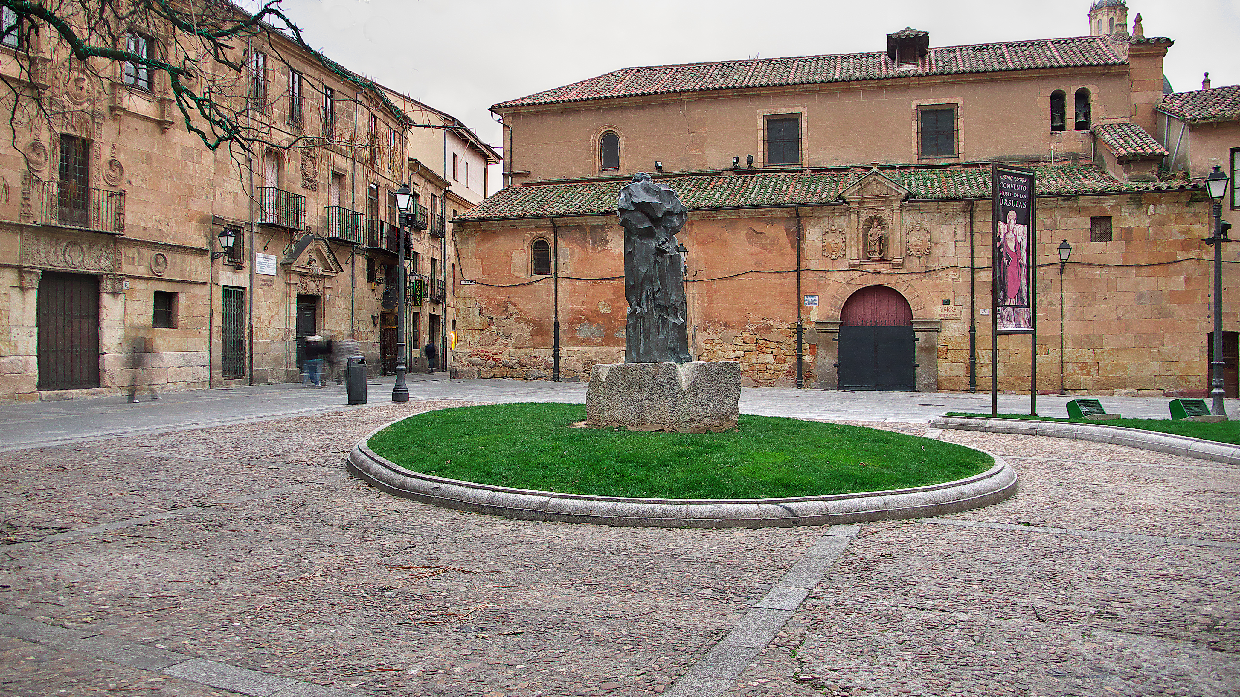 Iglesia del siglo XIII reconstruída en el siglo XVIII.